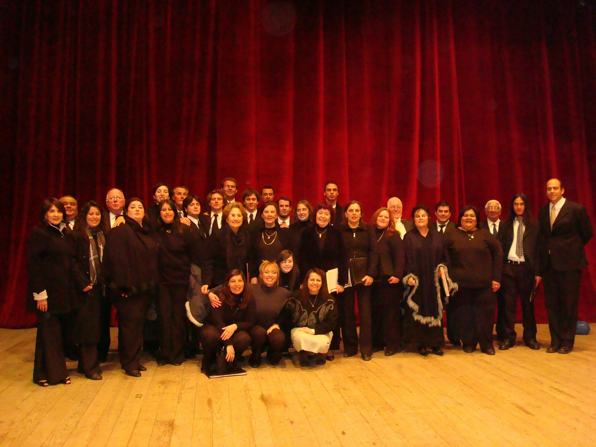 El coro Lírico de la Asociación Verdiana de Paraná fue fundado por el Maestro Lorenzo Anselmi el 12 de agosto de 1939; siendo en sus orígenes la "Schola Cantorum" de la Dante Alighieri. Junto a la Prof. Susana Echenique de Anselmi ha mantenido una larga y fecunda trayectoria. Ha intervenido en innumerables Encuentros y concursos Corales, tal es el caso del Encuentro Internacional de Coros organizado por la universidad de Montevideo y el S.O.D.R.E (Republica Oriental del Uruguay) y Función de Gala en la fiesta Patria uruguaya en el teatro Larrañaga de la ciudad de Salto. Cabe destacar la participación en el “II Concurso Internacional para Coros y Maestros de Capilla y Catedrales” organizado por el Vaticano en el año 1994 en la ciudad de Roma (Italia). En dicha oportunidad también ofreció conciertos en Florencia y Bari; llevando es su repertorio música argentina, en la que se destacó la interpretación de la “Misa Criolla” de Ariel Ramírez. Compartió escenario en varias ocasiones con la Orquesta Sinfónica de Entre Ríos, la Banda de la Policía de Entre Ríos y la Banda de la II Brigada de Paraná. Su repertorio esta basado fundamentalmente en obras de género operístico como así también sinfónico-corales. Es recordada su interpretación del “Réquiem” de W.A. Mozart junto a la Orquesta Sinfónica de Entre Ríos bajo la dirección del Mtro. Carlos Bergogna; y el concierto compartido con el famoso tenor argentino Darío Volonté. Ha recorrido casi todo el país ofreciendo conciertos en auditorios destacados. Dada su larga e ininterrumpida trayectoria, el Coro Lírico de la Asociación Verdiana de Paraná ha recibido importantes premios y distinciones, entre ellos el premio “Santa Clara de Asís” en 1991 como así también el reconocimiento del gobierno de Italia y de la Asociación “Dante Alighieri”.